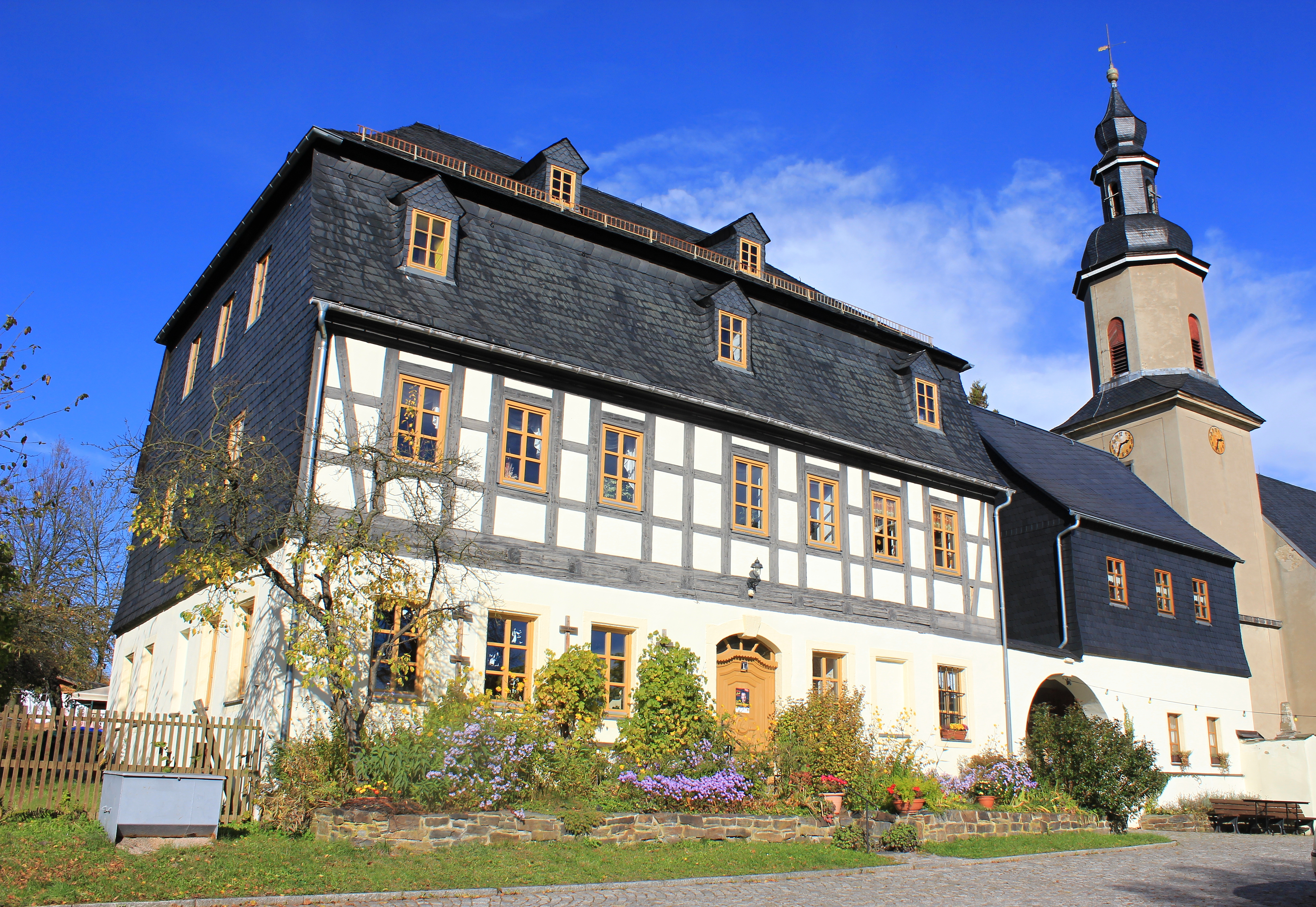 Wildbach. Ortsteil Bad Schlema. Sachsen.